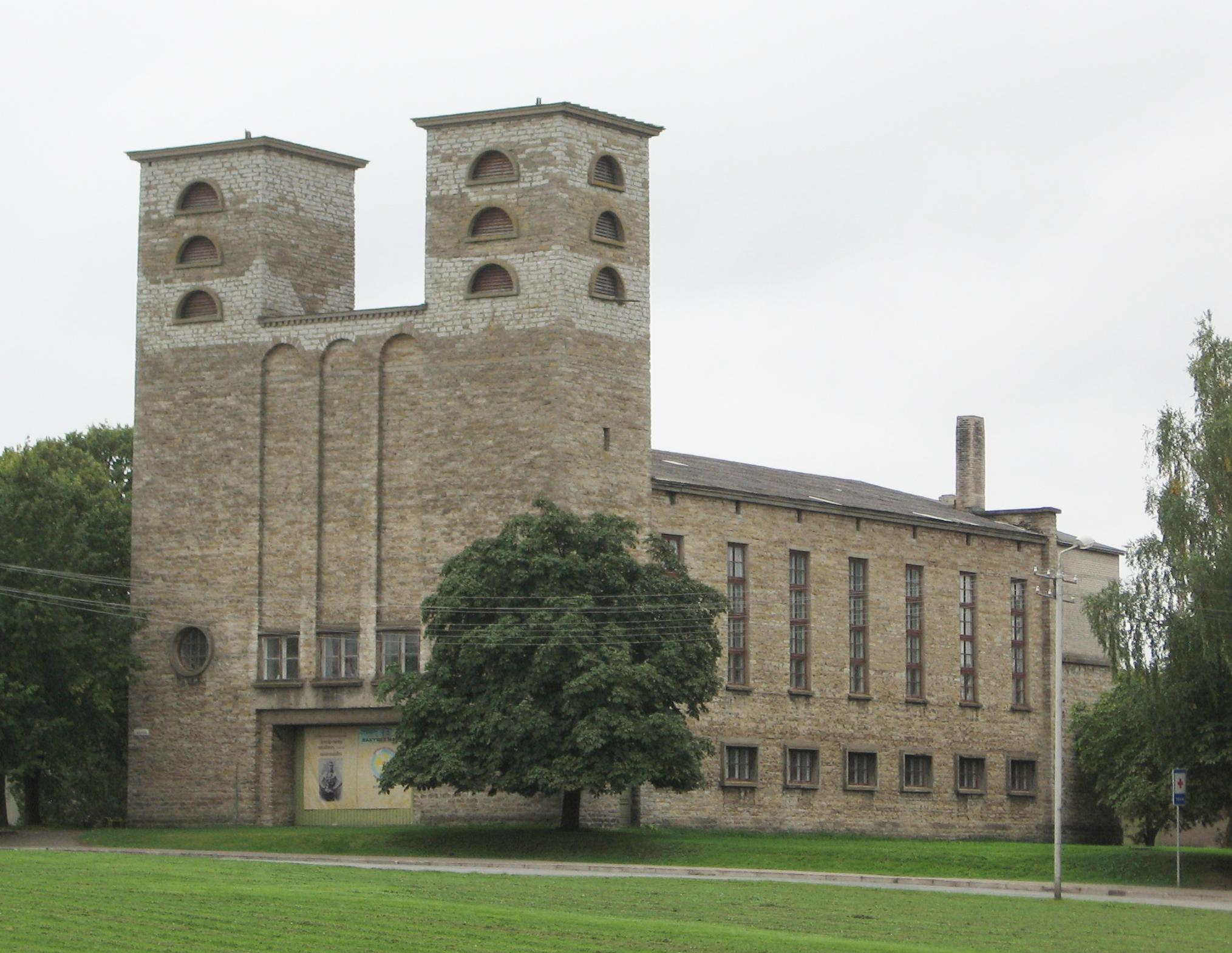 Rakvere Pauluse kirik